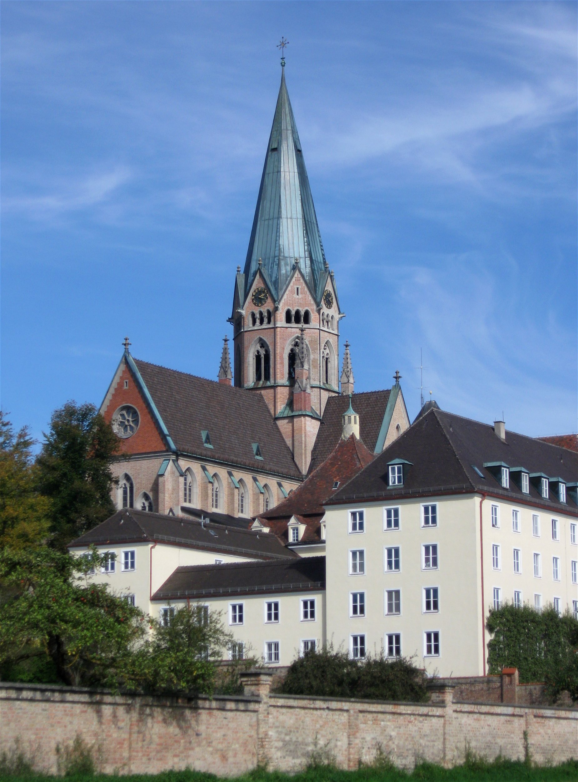 St. Ottilien, Eresing